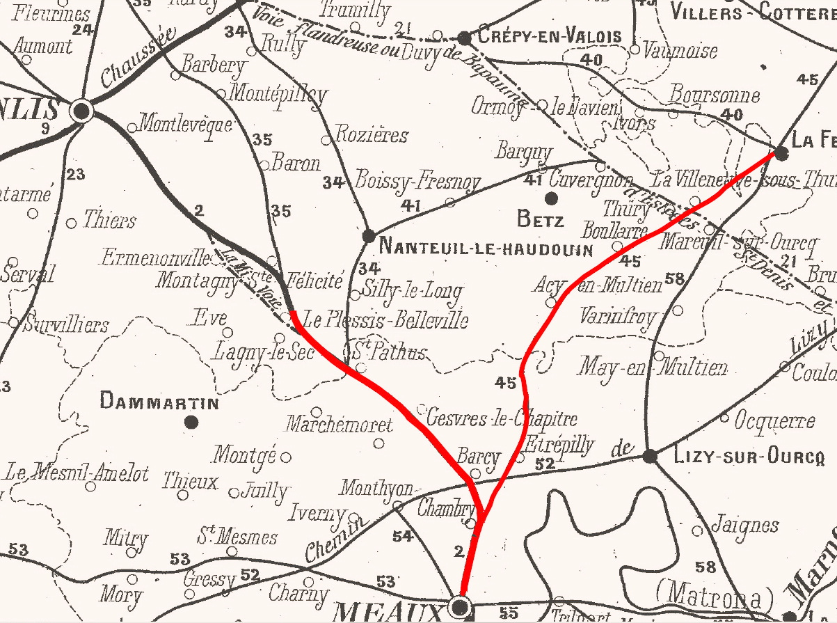 Carte des voies romaines du pays de Meaux